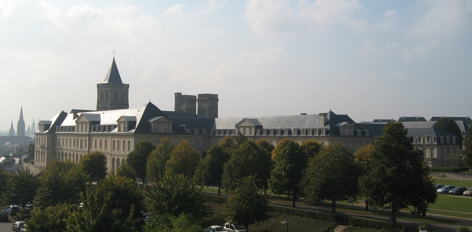 L'abbaye aux Dames depuis la butte du cèdre du Liban